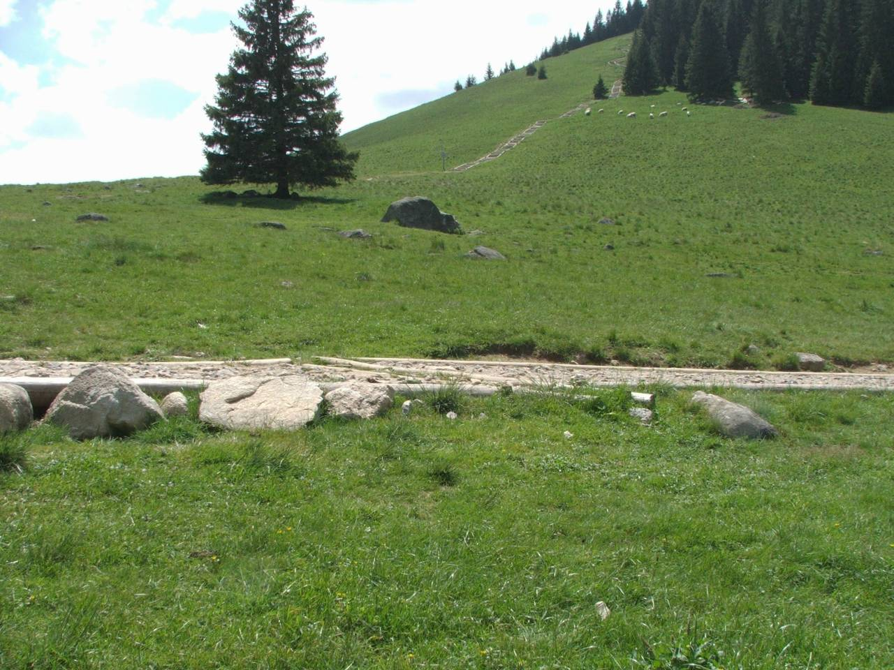 Rusinowa Polana. Część zachodnia i ścieżka turystyczna do Wiktorówek